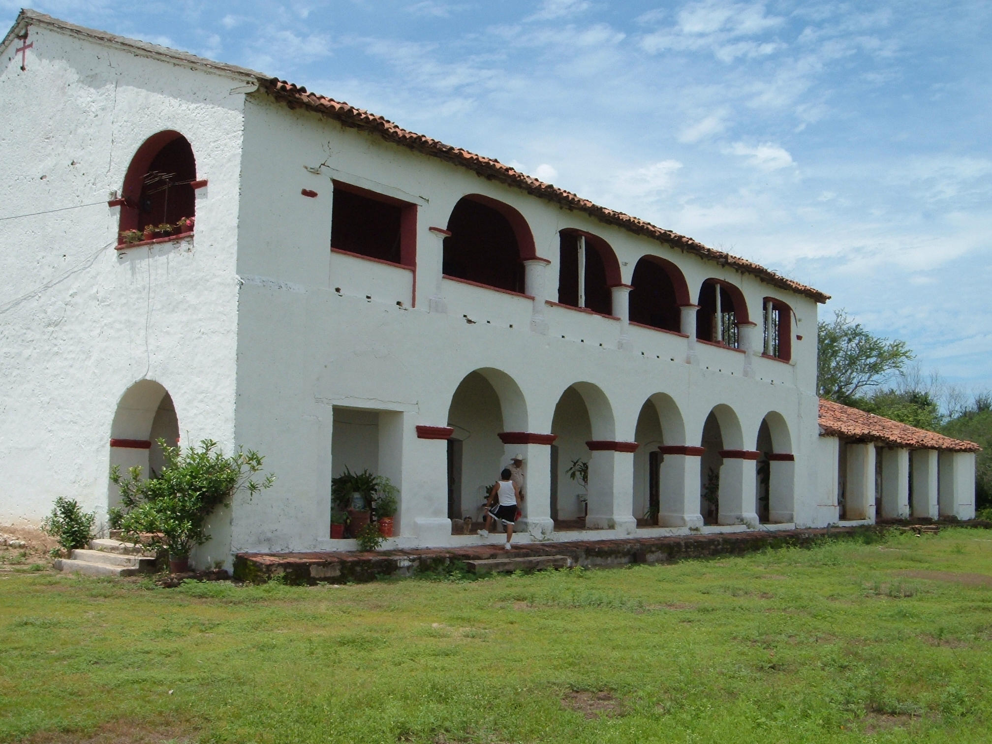 imagen de la ex hacienda de la labor